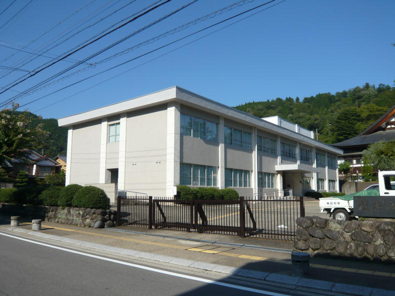 郡上簡易裁判所